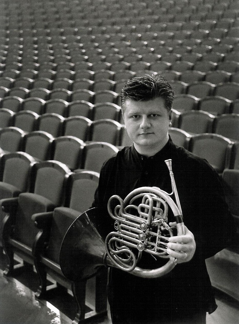 Tereza z Davle, fotografické dílo